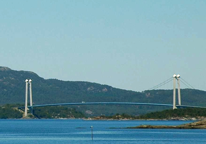 Siggjo og Bømlabrua.